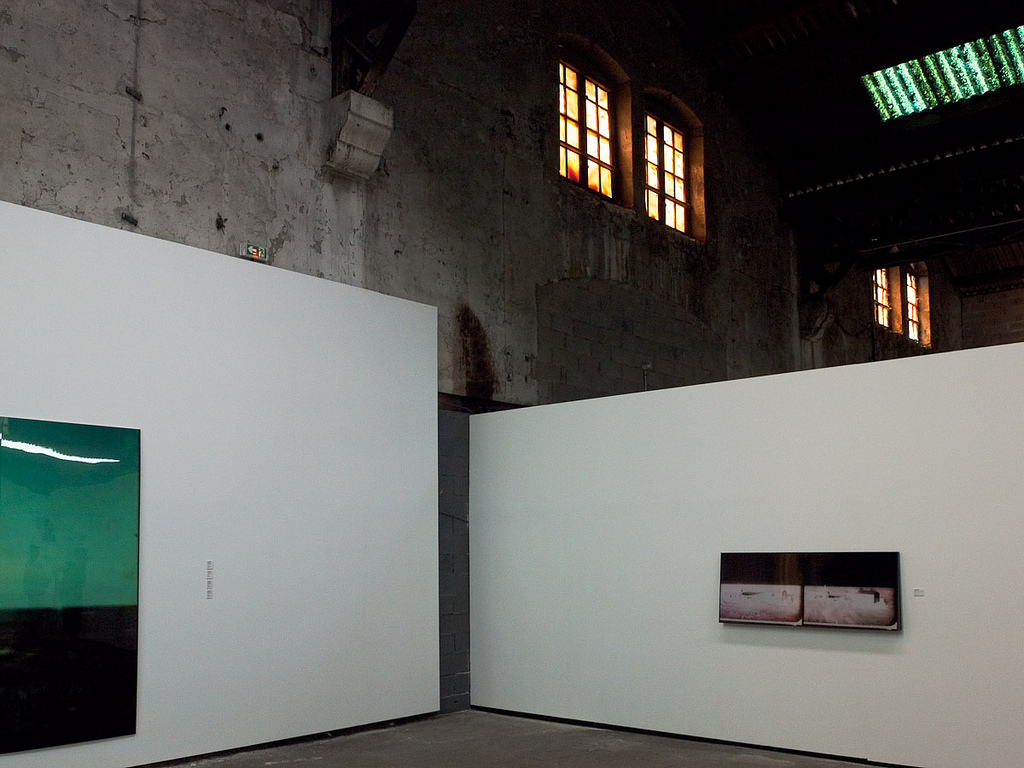 Les Rencontres d'Arles, Argentine trail, Ateliers des Forges, Arles.